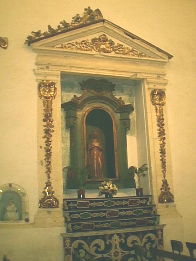 Altare laterale nella chiesa di Sant'Agostino (XVI secolo) a Cagliari